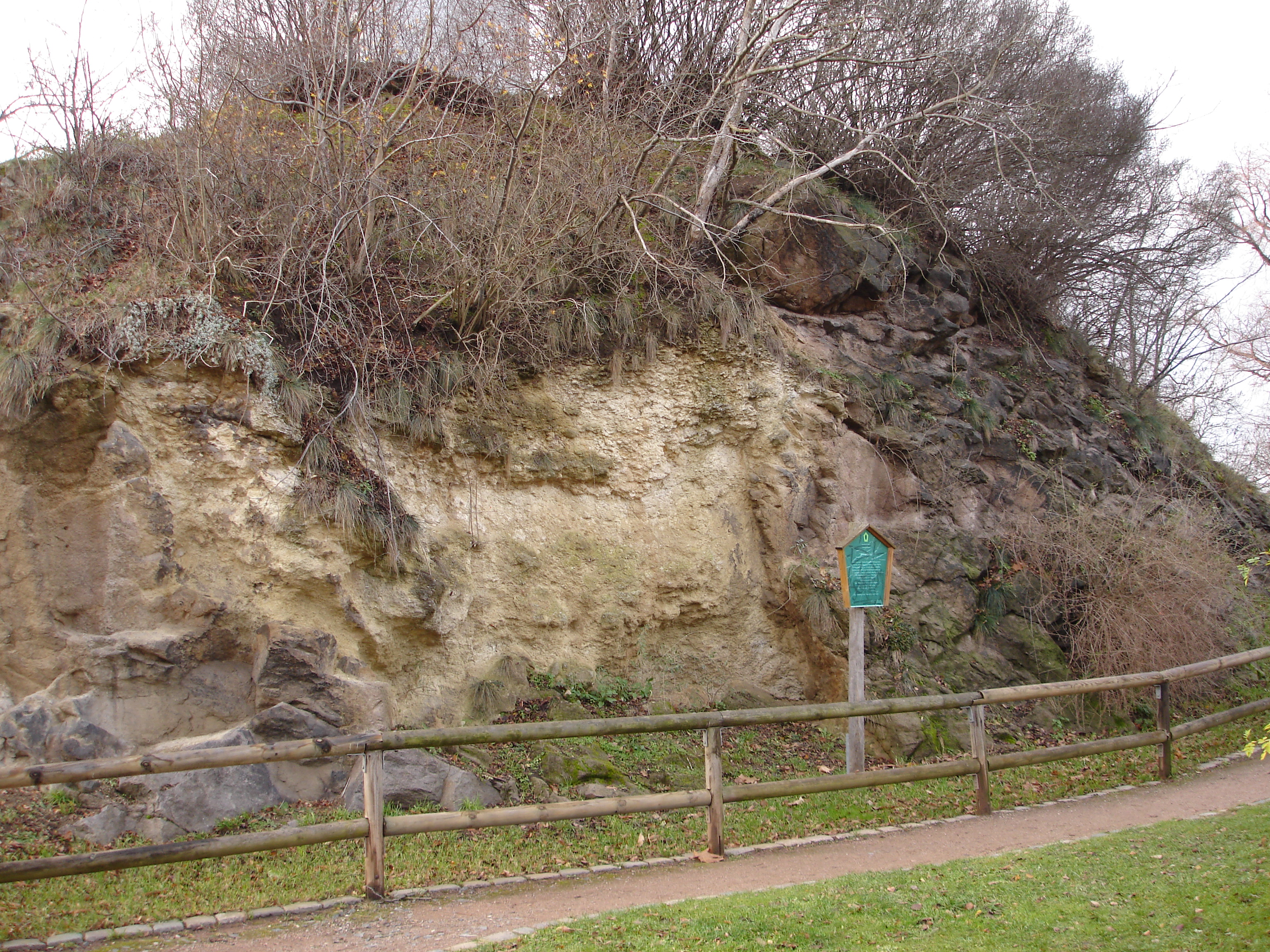 Naturdenkmal Hoher Stein in Dresden-Plauen